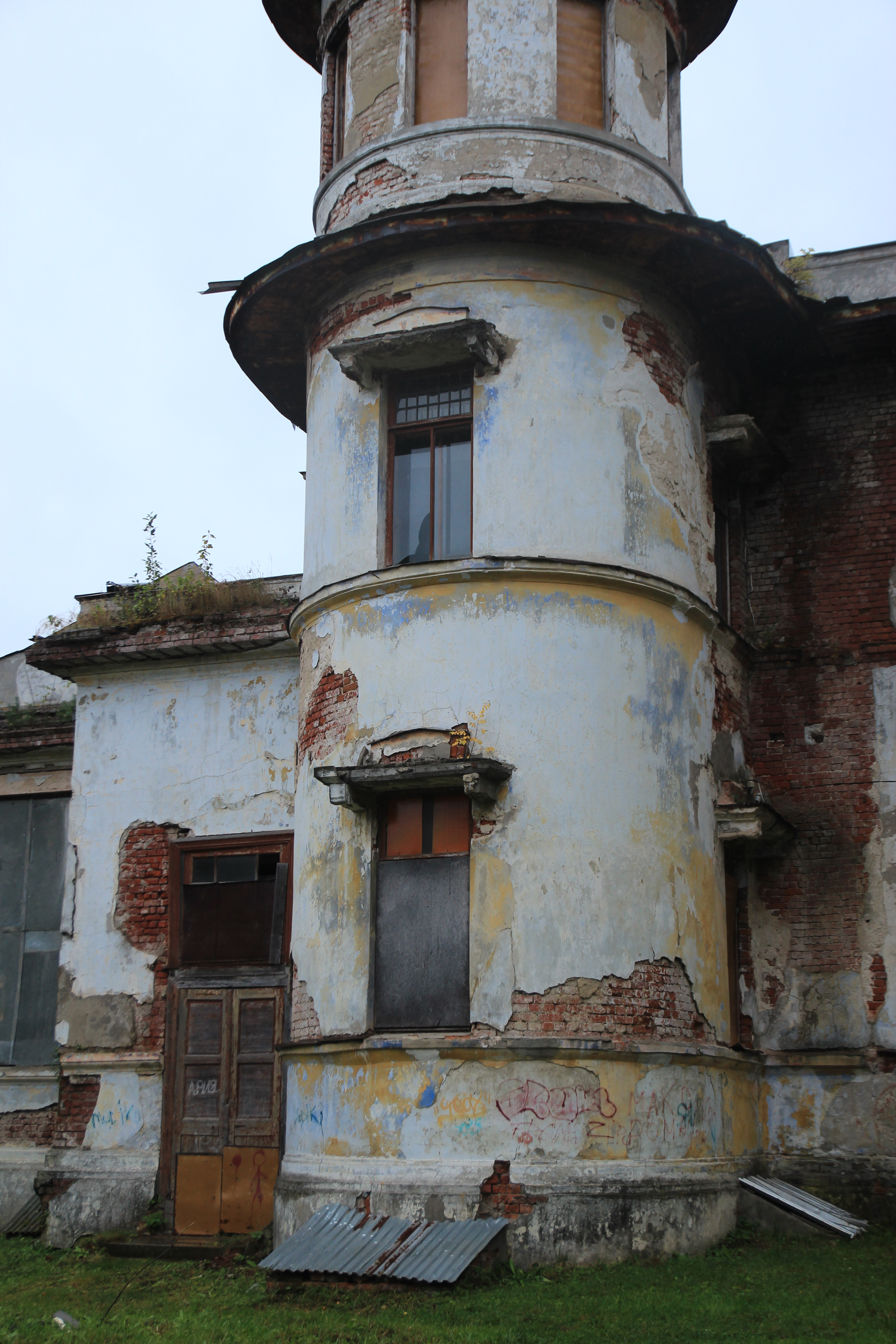 Фото башни дачи Севрюгова